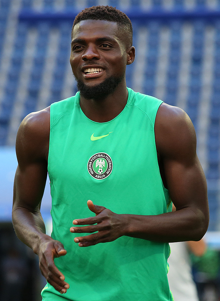 Сборная Нигерии с улыбкой готовится к матчу против Аргентины